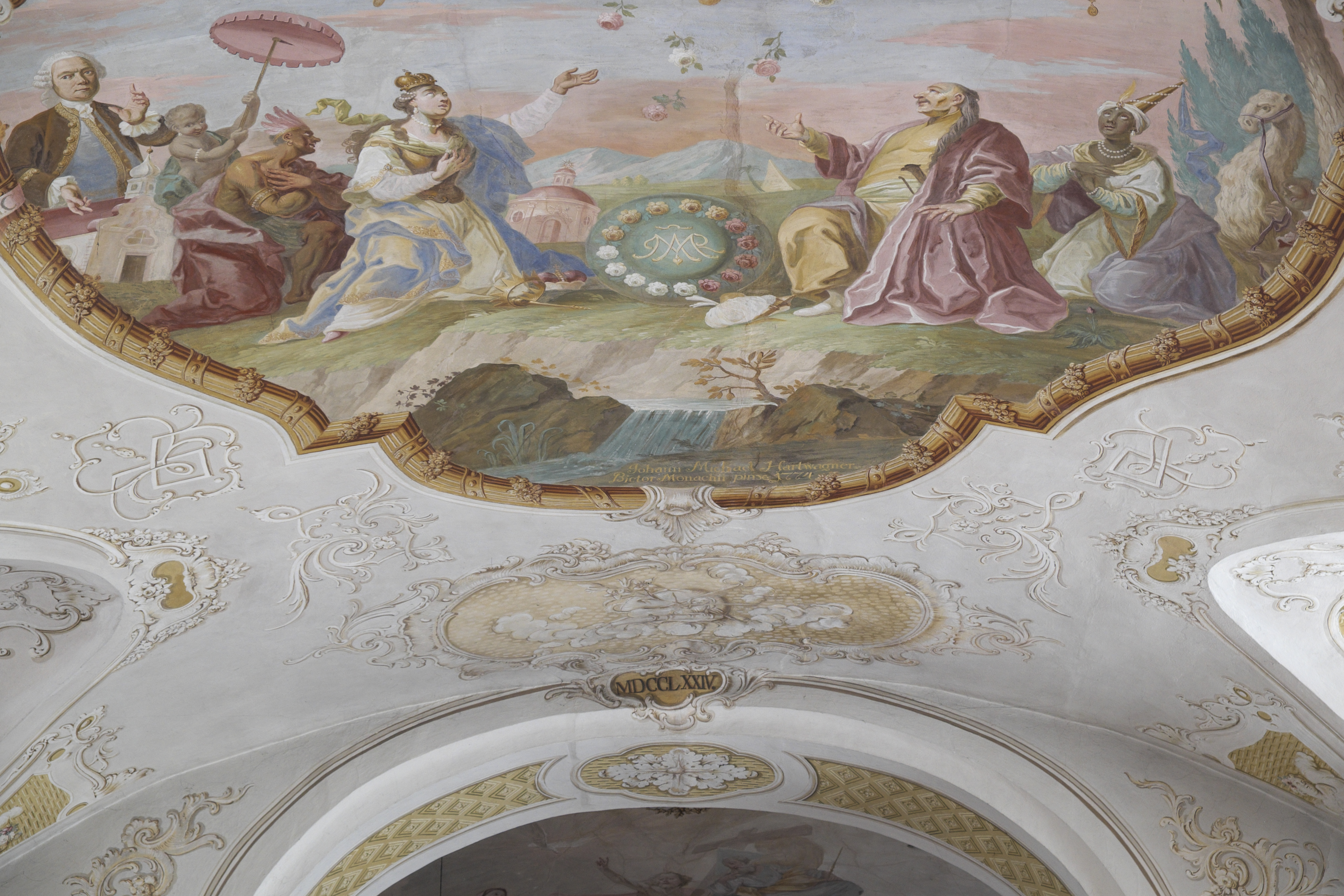 Ehemalige Dominikanerinnenklosterkirche St. Peter und Paul, heute Filialkirche, in Altenhohenau (Griesstätt) im Landkreis Rosenheim (Bayern/Deutschland), Deckenmalerei; Signatur: Johann Michael Harwagner Bictor Monachii pinx 1774